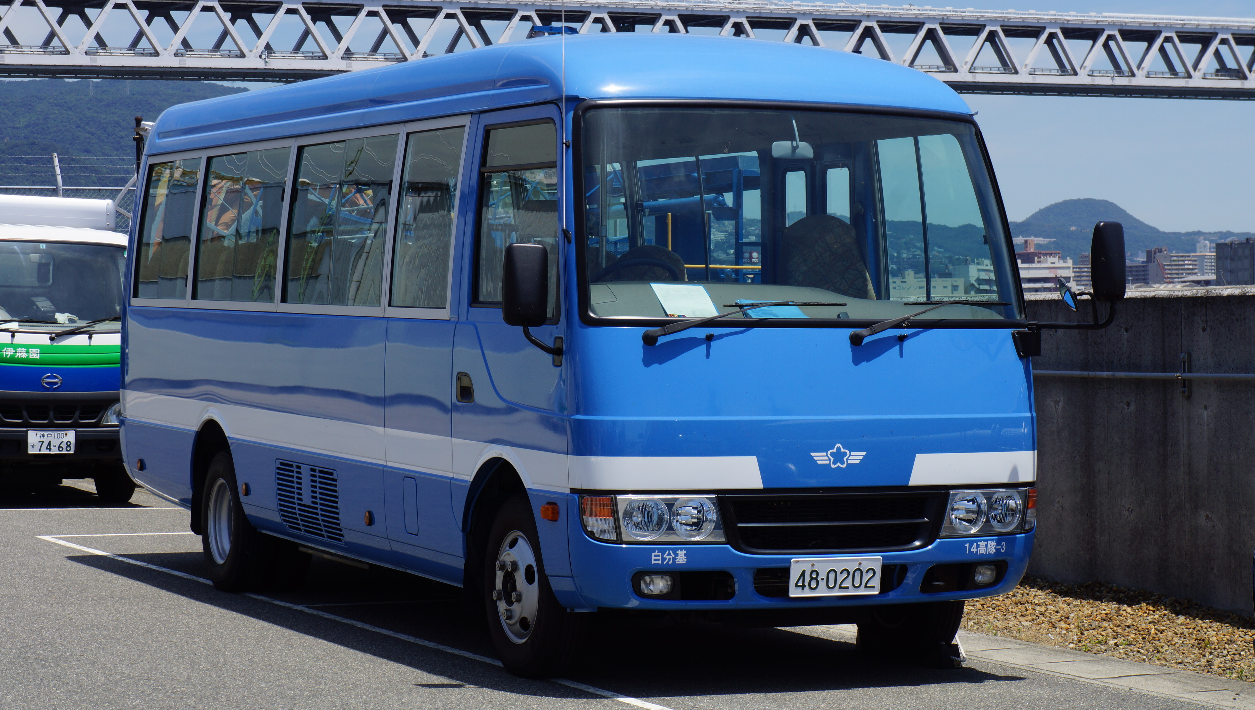 航空自衛隊 小型人員輸送車（KC-BE632E）。 13年7月20日 海上自衛隊阪神基地にて。